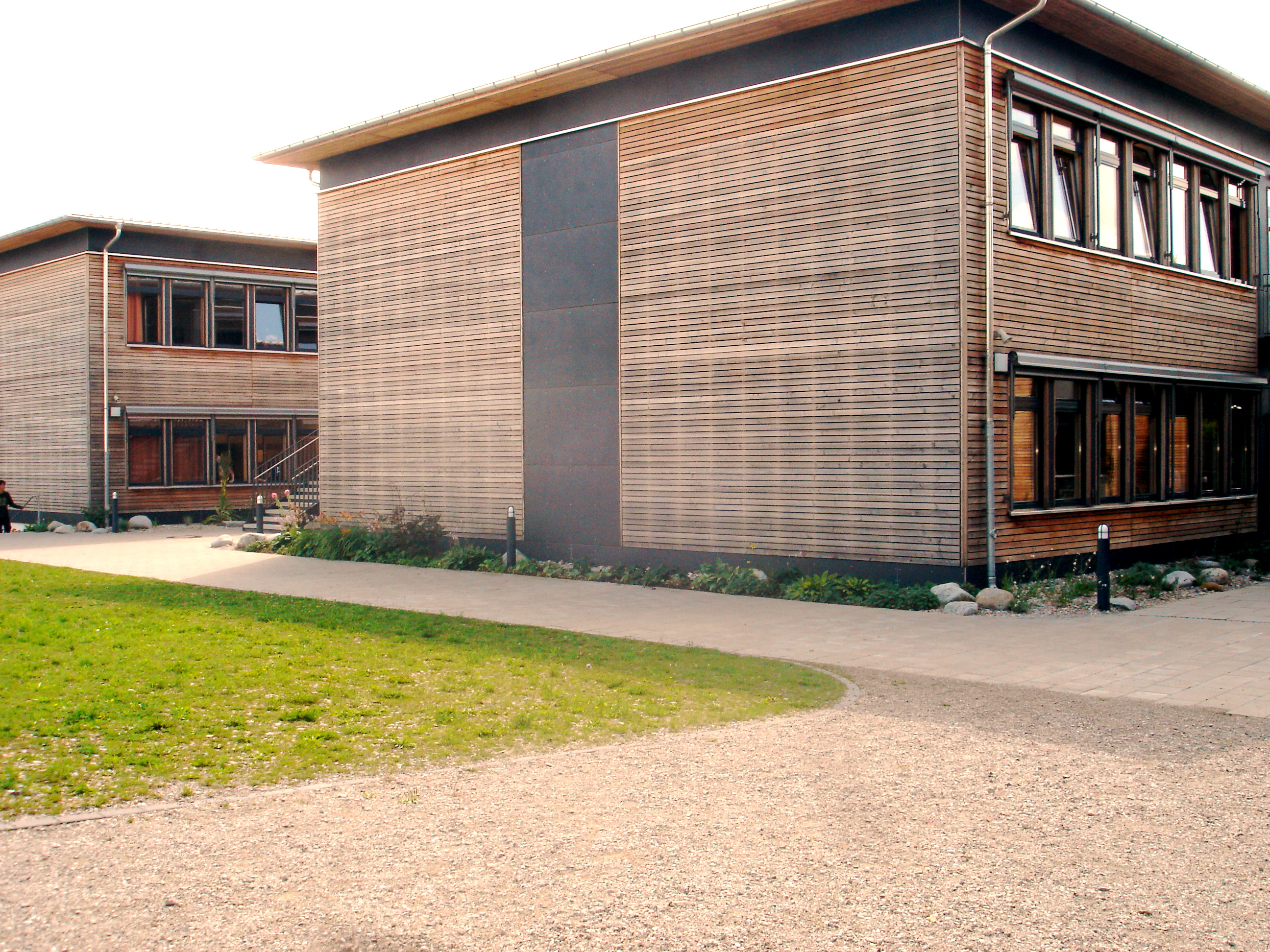 Klassentrakt des Camerloher-Gymnasiums Freising.